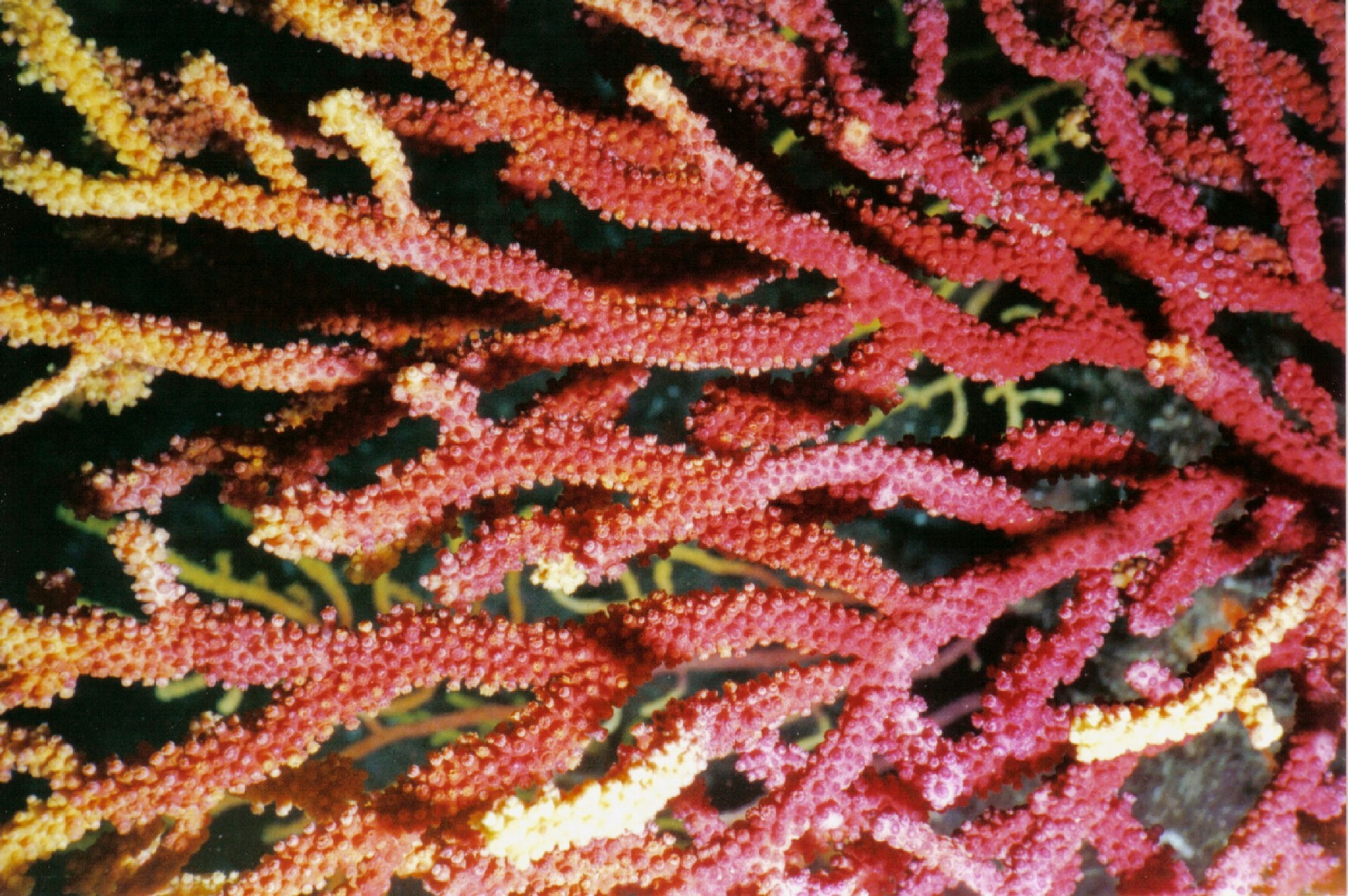 Gorgonie 1